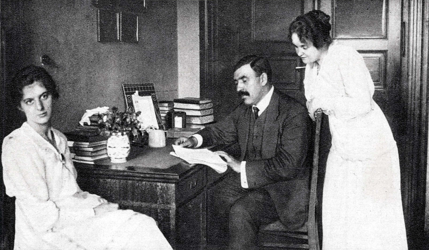 Garbai Sándor a feleségével és a lányával